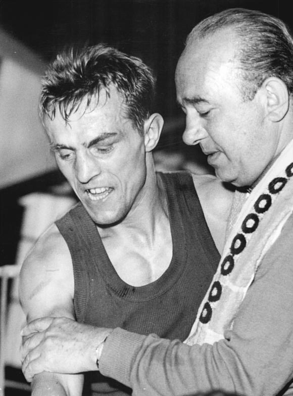 Heinz Schulz, Erich Sonneberg Zentralbild Studré 31.5.1964 Schwerin: Olympia-Ausscheidungskämpfe im Boxen In der Schweriner Sport- und Kongress-Halle wurden am 30.5.64 die ersten fünf Box-Fahrkarten nach Tokio verteilt. Mit Otto Babiasch, Heinz Schulz, Heiko Winter und Jürgen Schlegel qualifizierten sich bereits 4 DDR-Boxer für das olympische Turnier. Den 5.Platz erkämpfte sich der westdeutsche Paul Hogh. UBz: Überglücklich verläßt Federgewichtler Heinz Schulz (DDR), gestützt von Verbandstrainer Erich Sonnebeerg den Ring. Der Westberliner Manfred Machs hatte gegen den Berliner Rechtsausleger keine Chance und unterlag eindeutig nach Punkten.